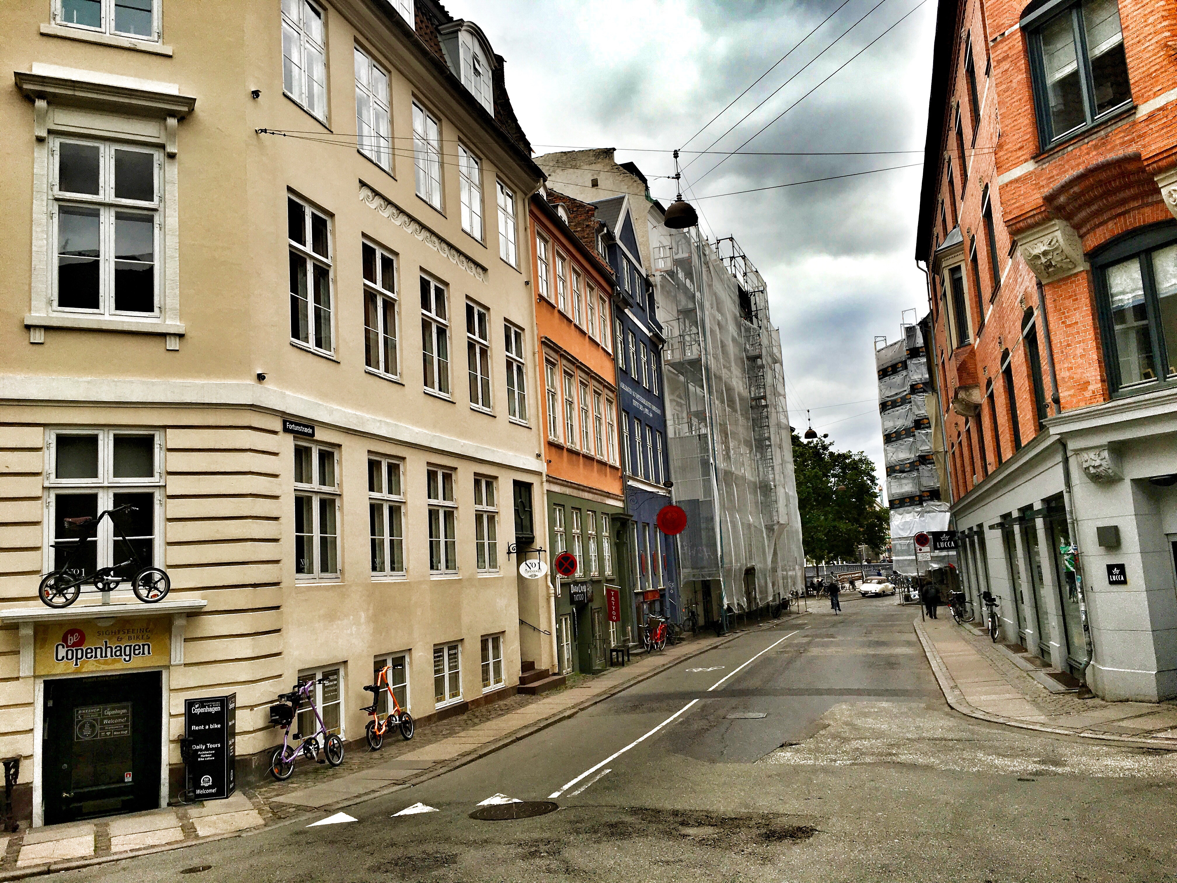 Fortunstræde i Indre By, København